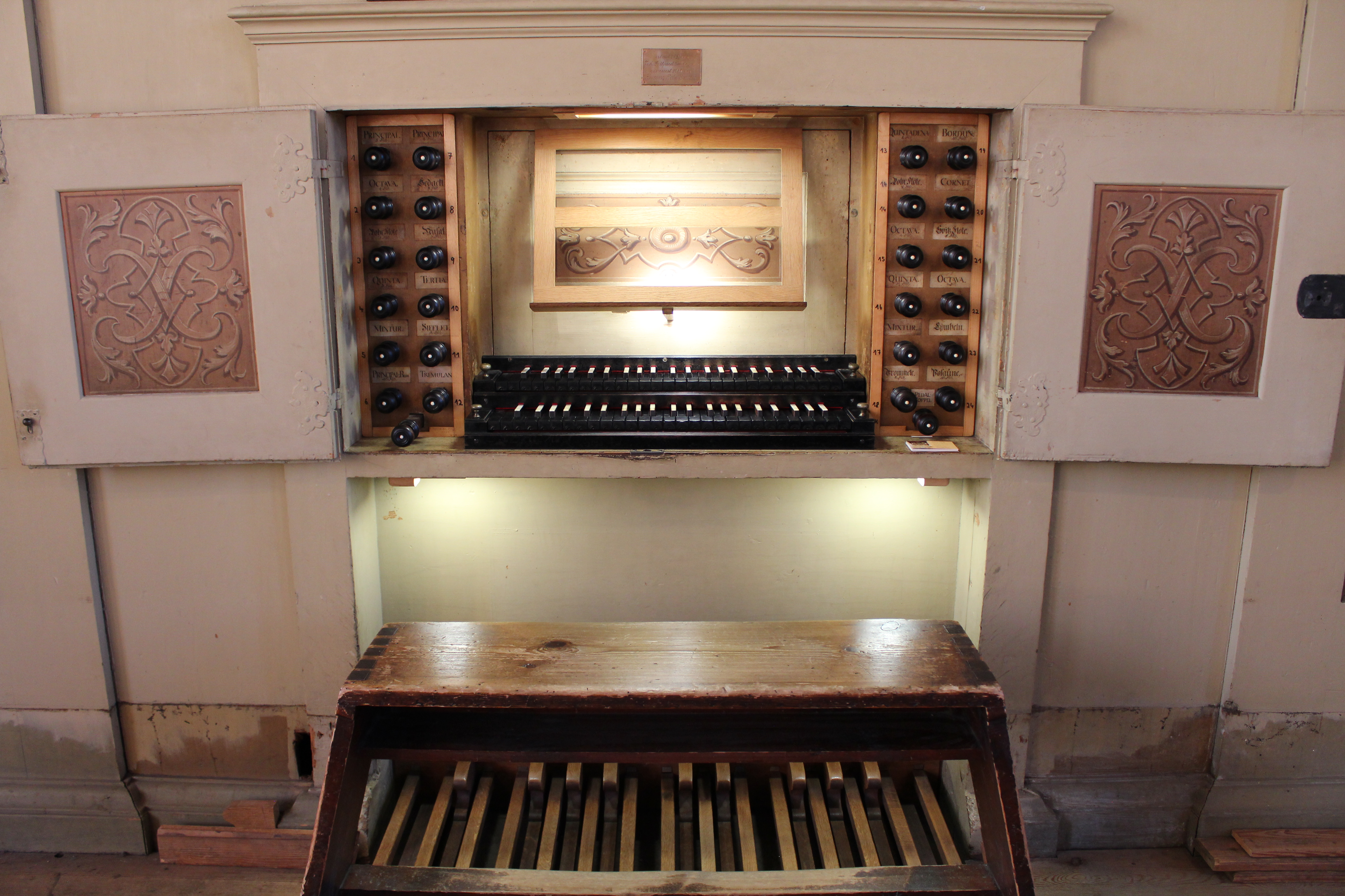 한국어 (조선): 뢰타 게오르겐교회 질버만오르간 1721년 제작